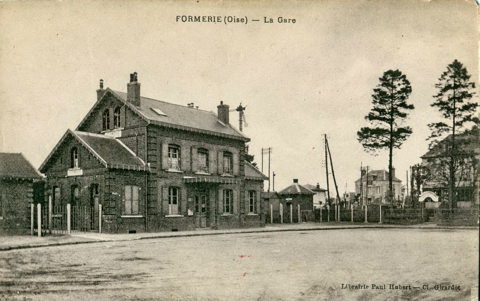 Carte postale ancienne éditée par Hubert FORMERIE : La Gare